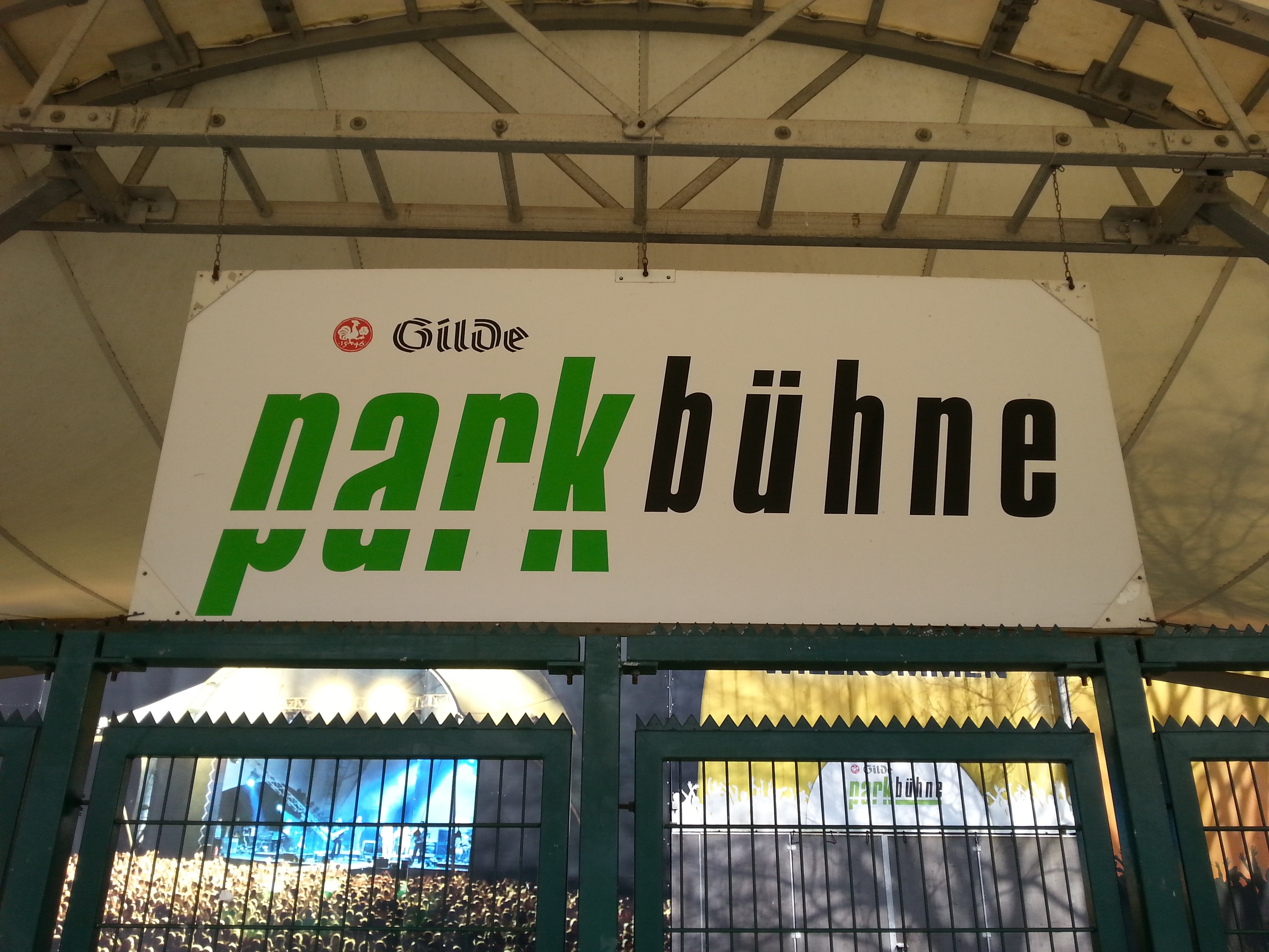 Das Eingangsschild der wieder in Gilde Parkbühne umbenannten Einrichtung. Diese hieß zwischen 2010 und 2012 nur Parkbühne, wie auf dem anderen Foto vom Eingangsbereich zu sehen ist.